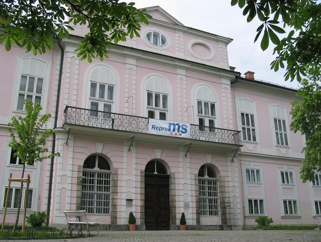 Cekin Castle, Ljubljana photo:Ziga 13:54, 3 May 2006 (UTC)